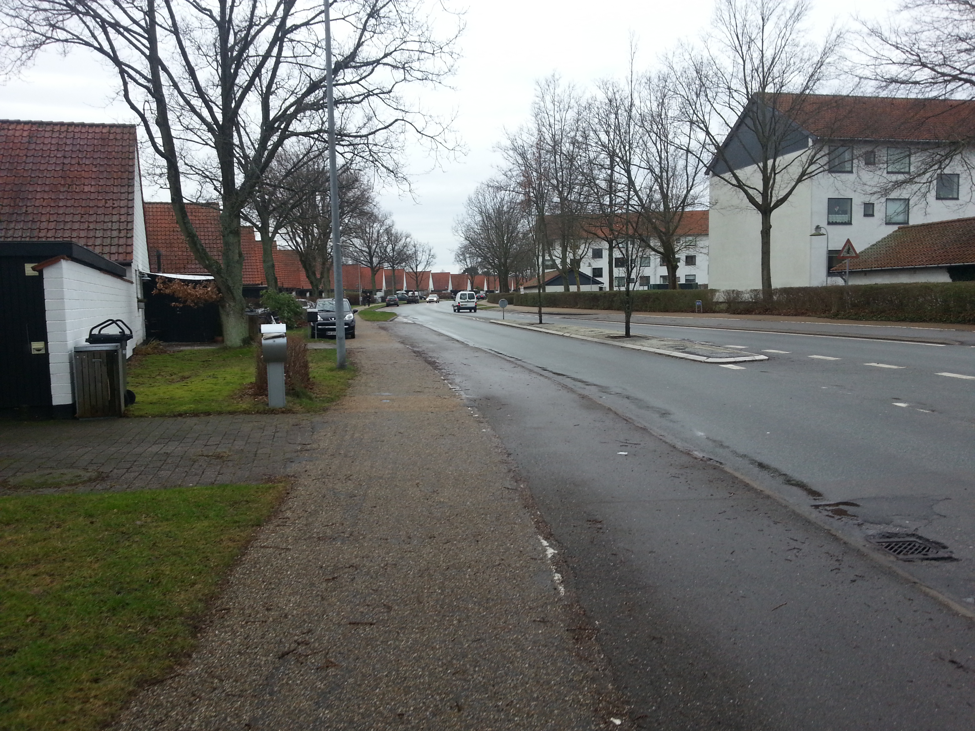 Parti fra Søndermarken. Kædehuse til venstre, etagehuse til højre.